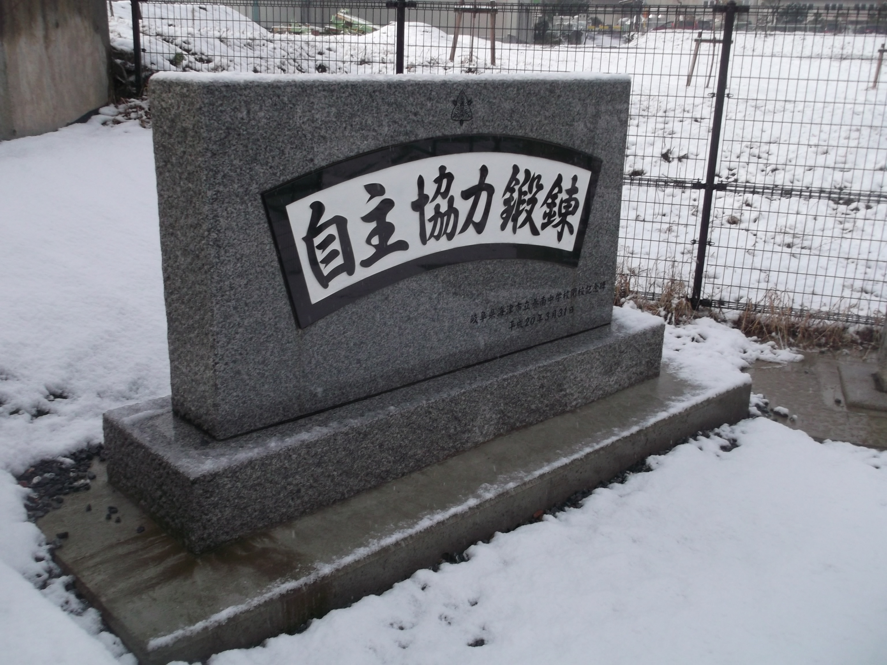 海津市立養南中学校閉校記念碑